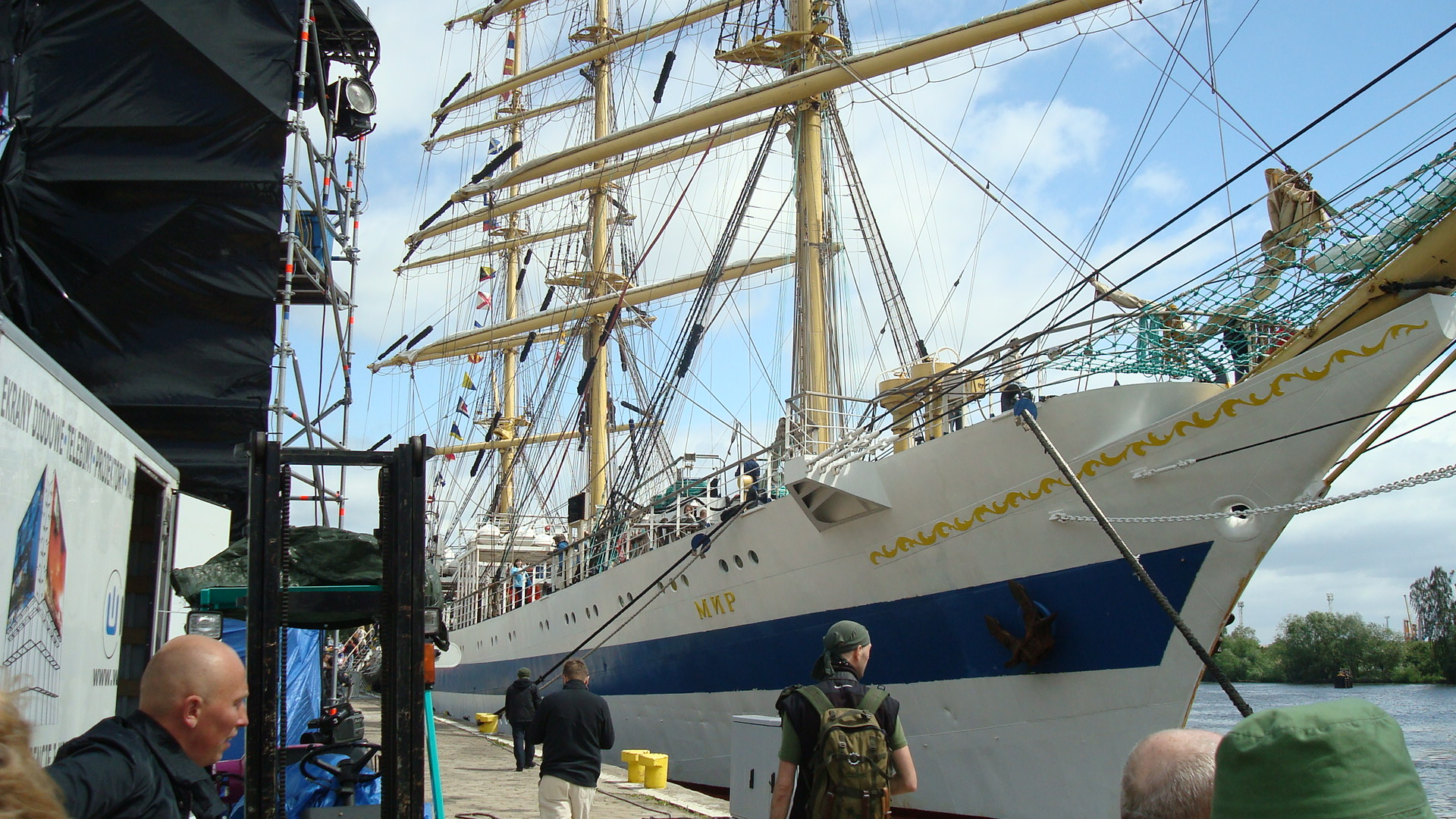 Szczecin,Dni Morza 2009-Żaglowiec"Mir"("Pokój")przy Bulwarze Chrobrego